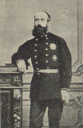 Manuel María Fernández de Prada y Pareja, marqués de las Torres de Orán.